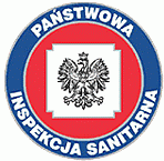 Państwowa Inspekcja Sanitarna - logo